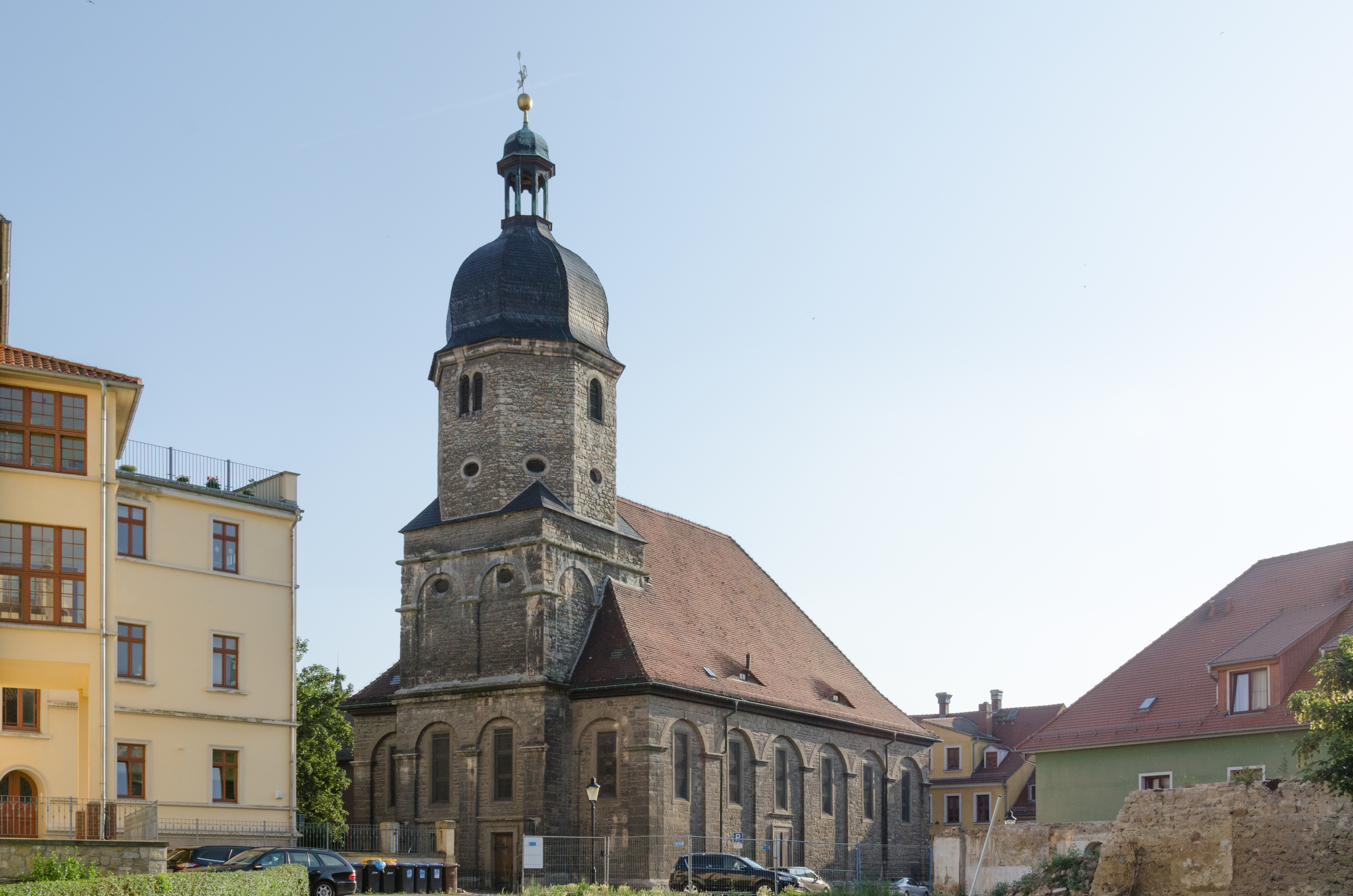 Naumburg, Kirche St. Othmar